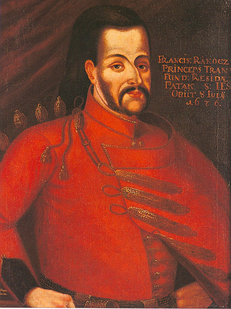 Felsővadászi I. Rákóczi Ferenc (Gyulafehérvár, 1645. február 24. – Zboró, 1676. július 8.) választott erdélyi fejedelem.